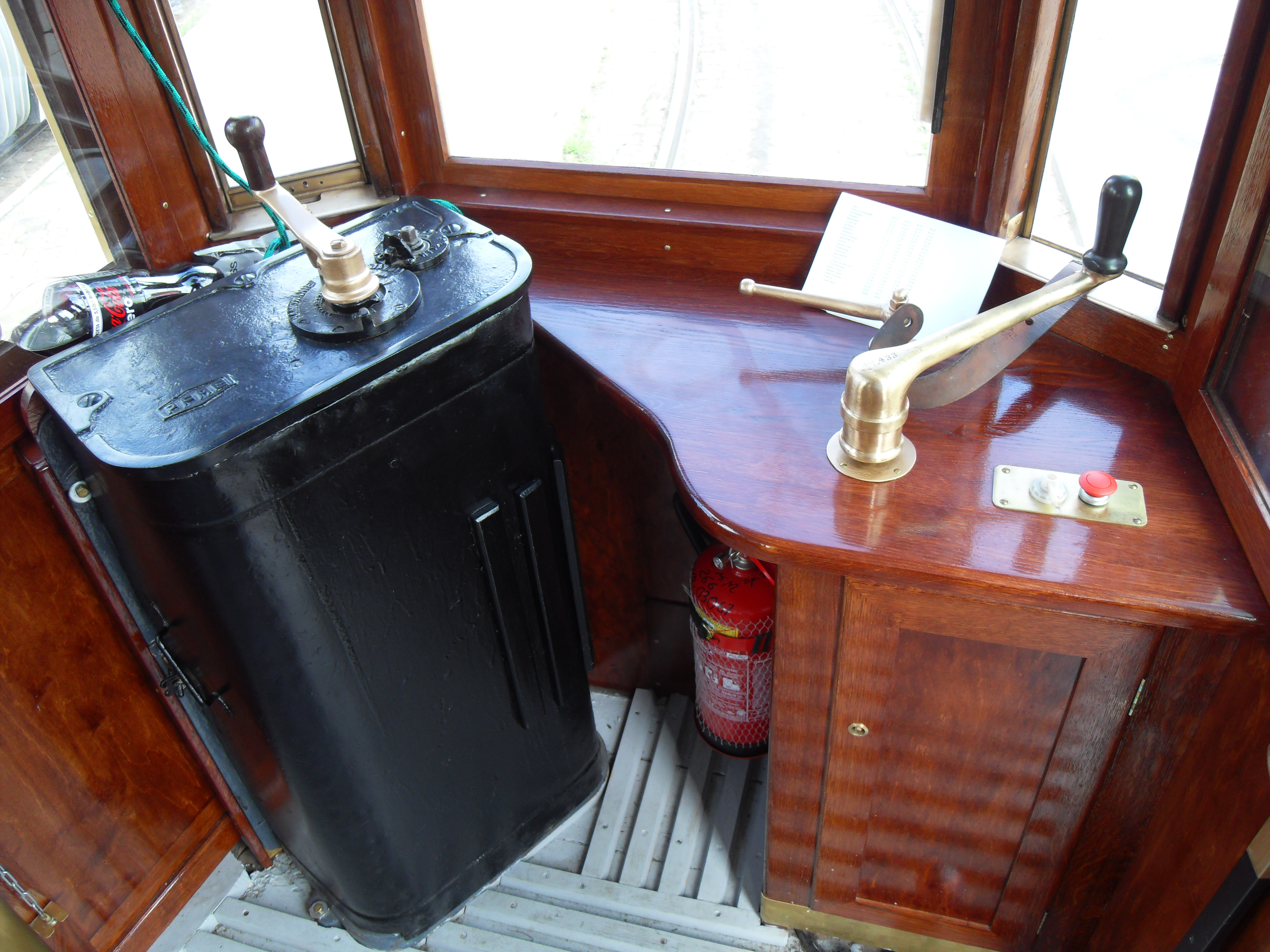 Tramwaj Bergmann w Gdańsku, stanowisko motorniczego.